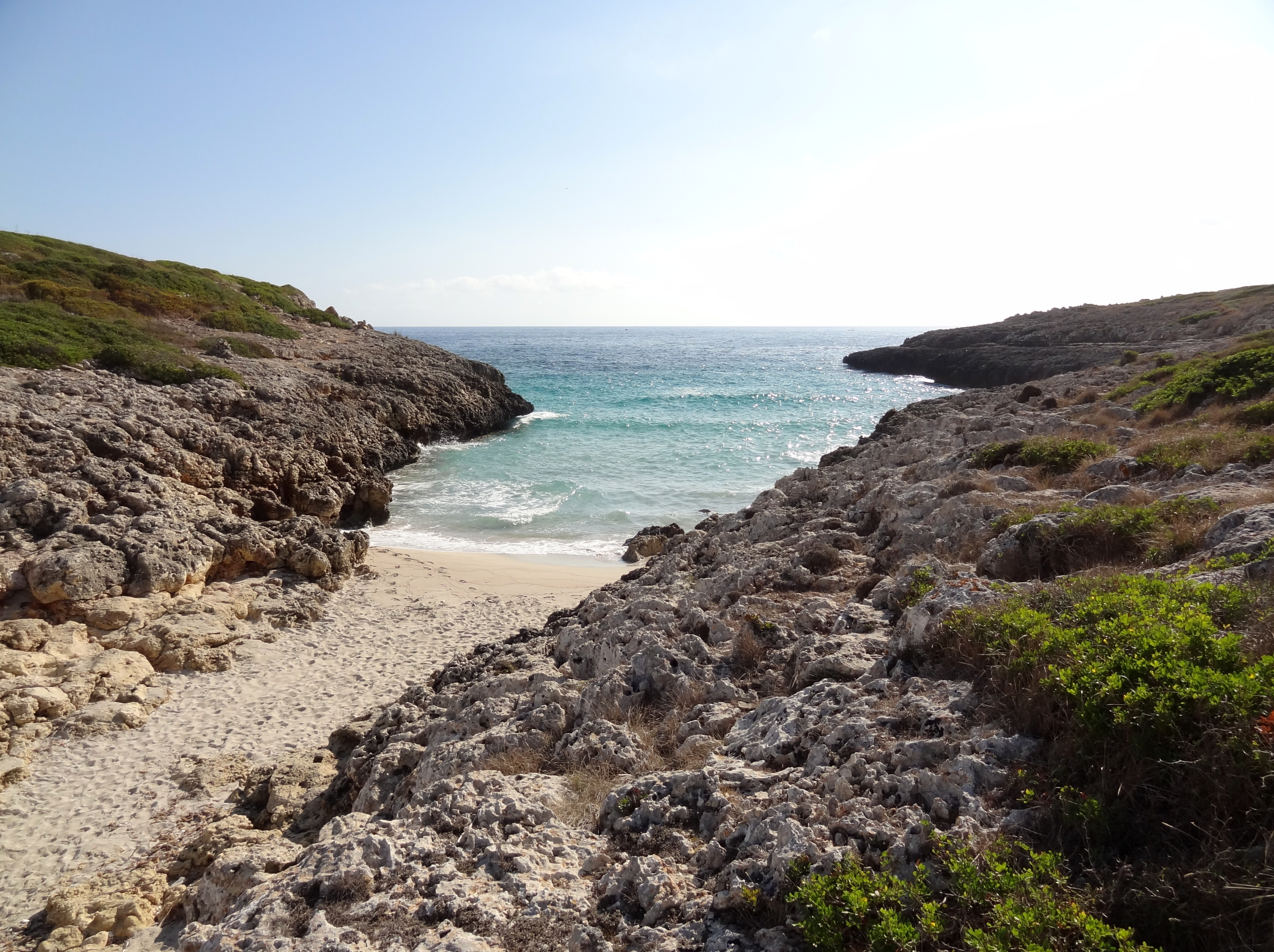 Caló des Serral, kleine Bucht an der Küste der Gemeinde Manacor, Mallorca, Spanien